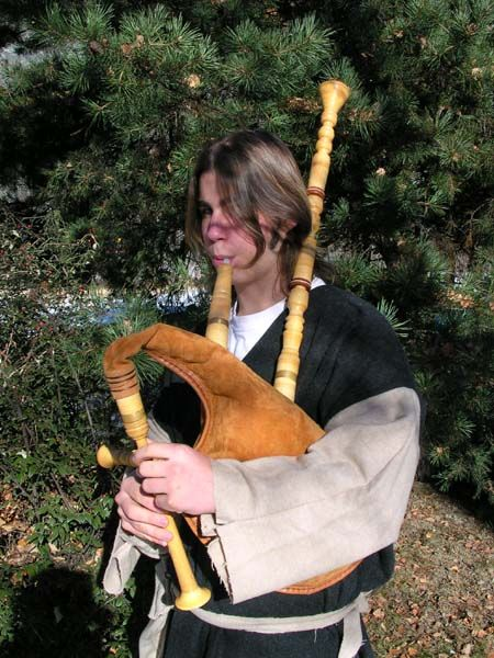 Un suonatore di baghèt in costume tradizionale.